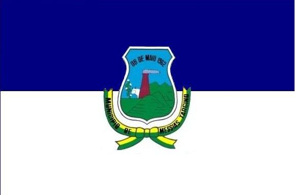 Bandeira do Município de Messias Targino, no estado do Rio Grande do Norte.